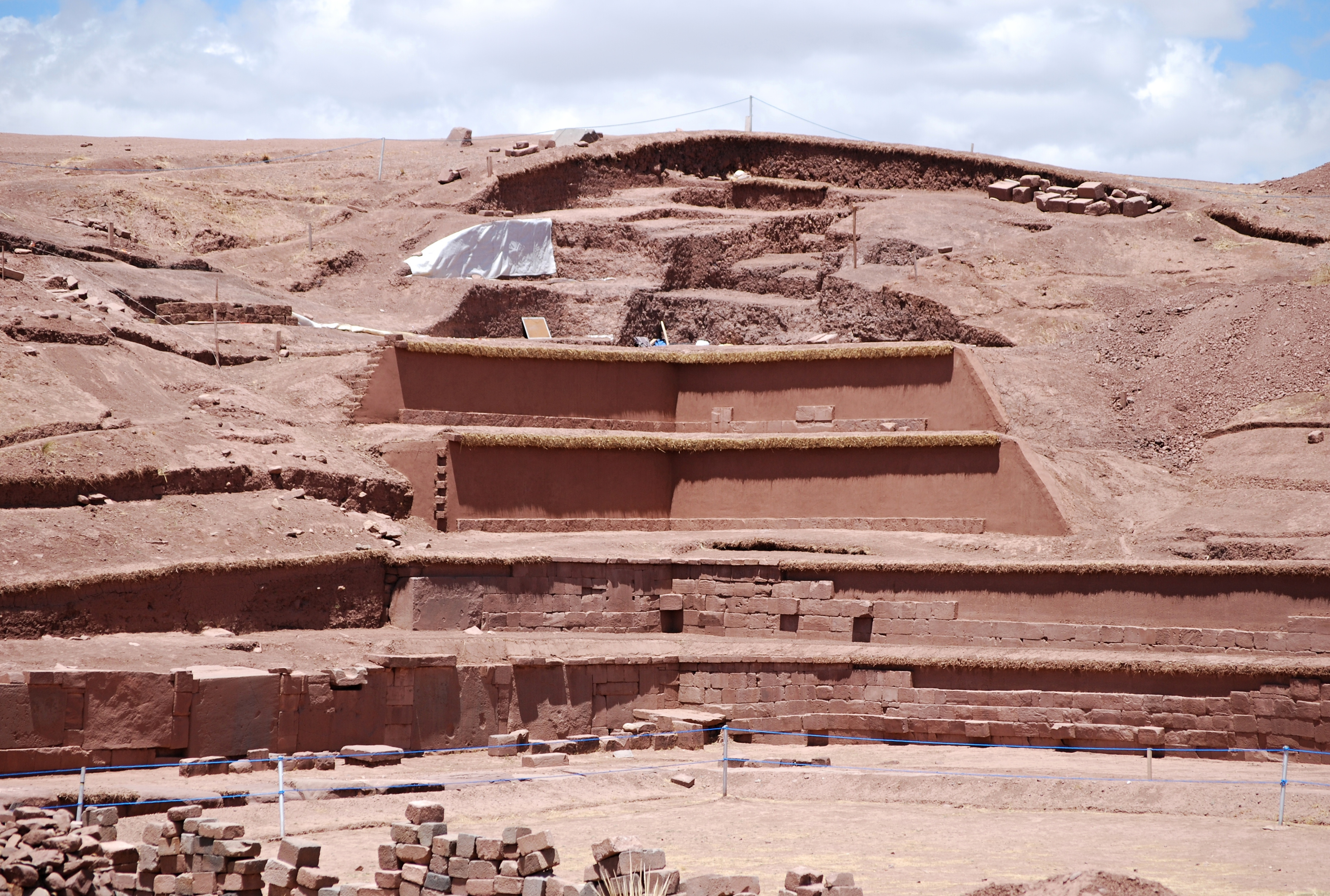 Tiwanaku